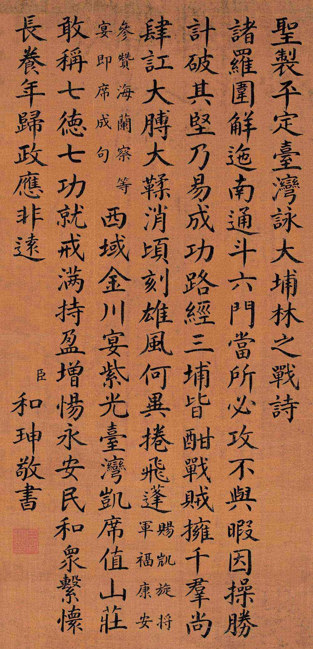 和珅楷书《平定台湾咏》